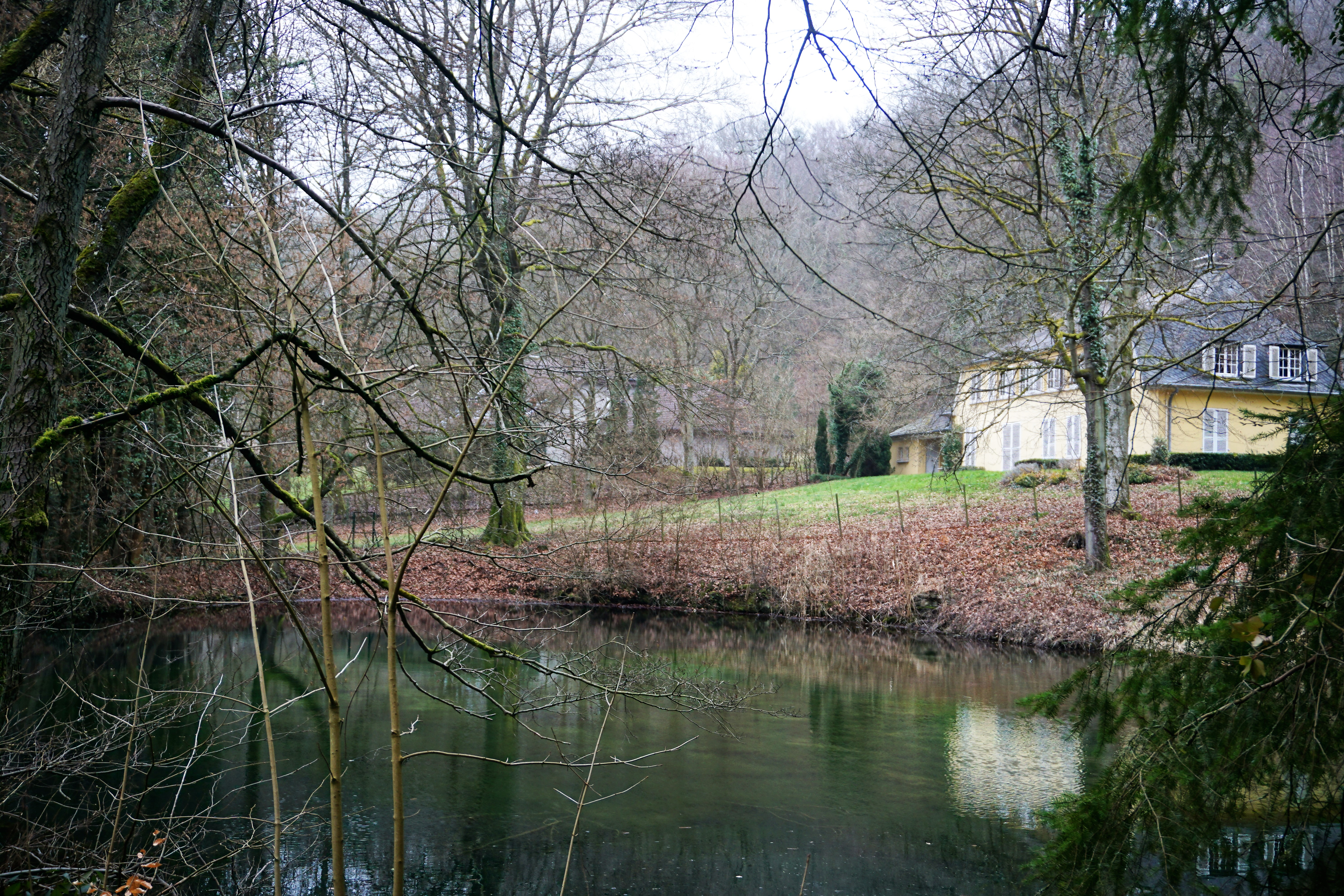 Luxembourg, lieu-dit Dauschbur à Dommeldange.